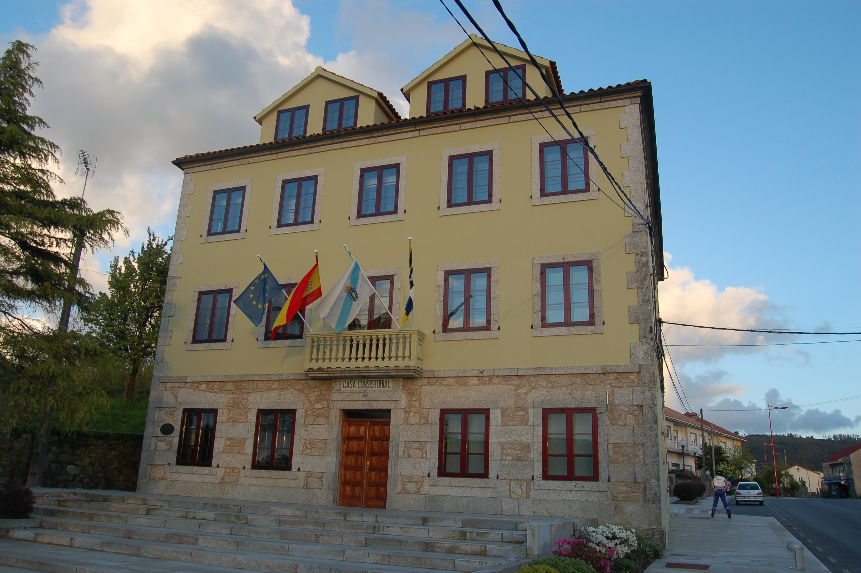 casa consistorial de Dumbría